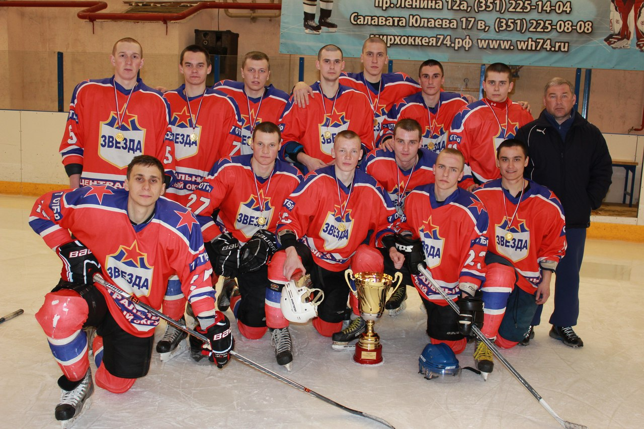 Хоккейный клуб "Звезда" двукратный чемпион Челябинской области